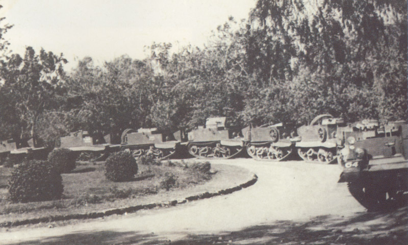 שיריוניות בריטיות בחצר יגור 1946 ארכיון ההגנה